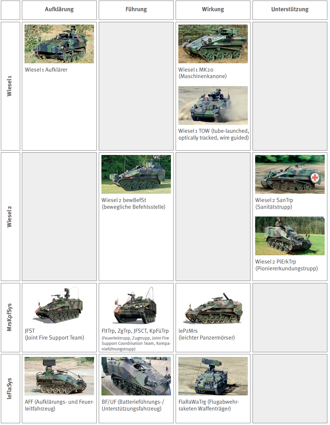 Übersicht über die Wiesel Fahrzeugfamilie nach Funktion und Fahrzeuggeneration